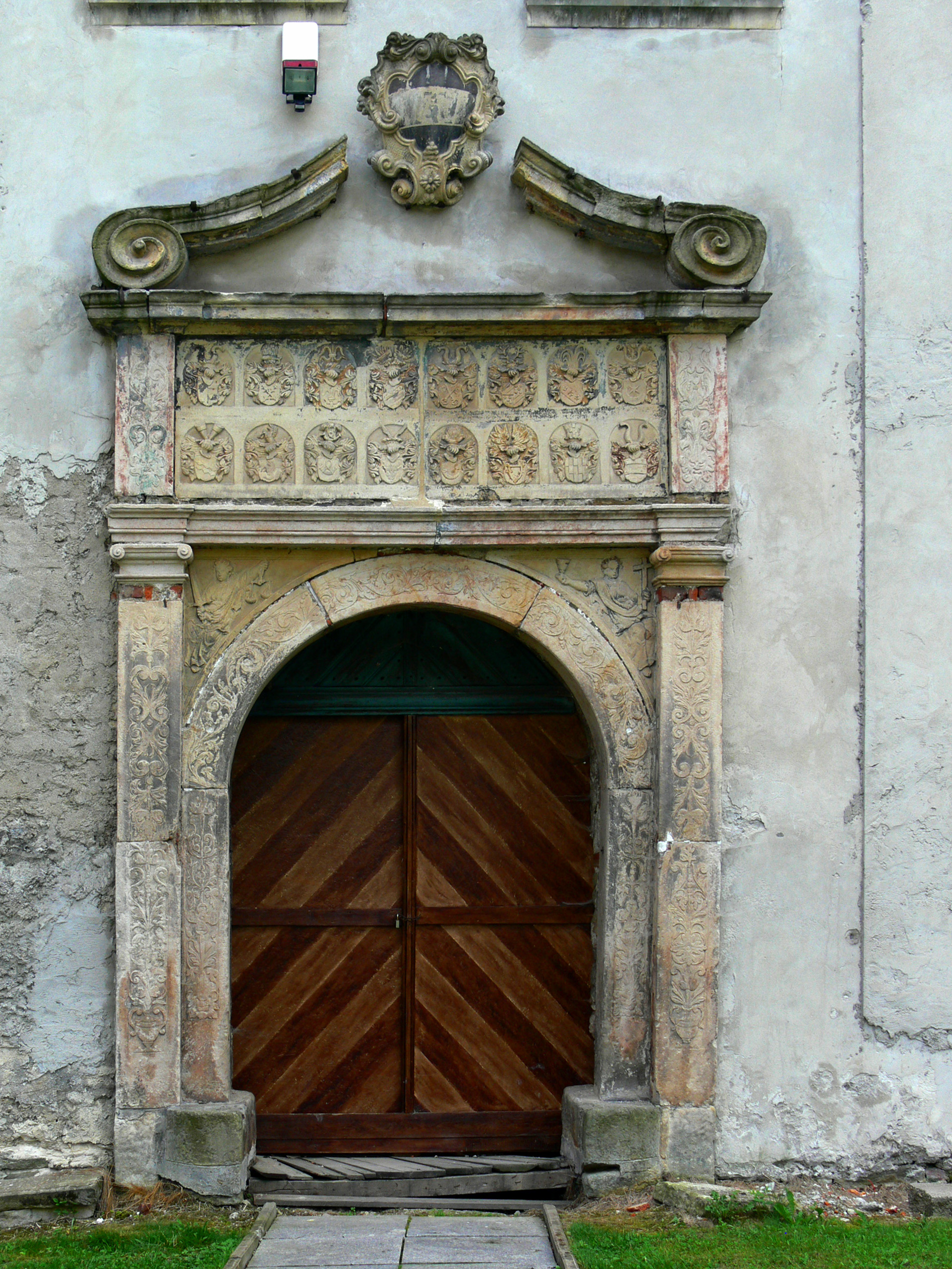 Międzylesie, zamek